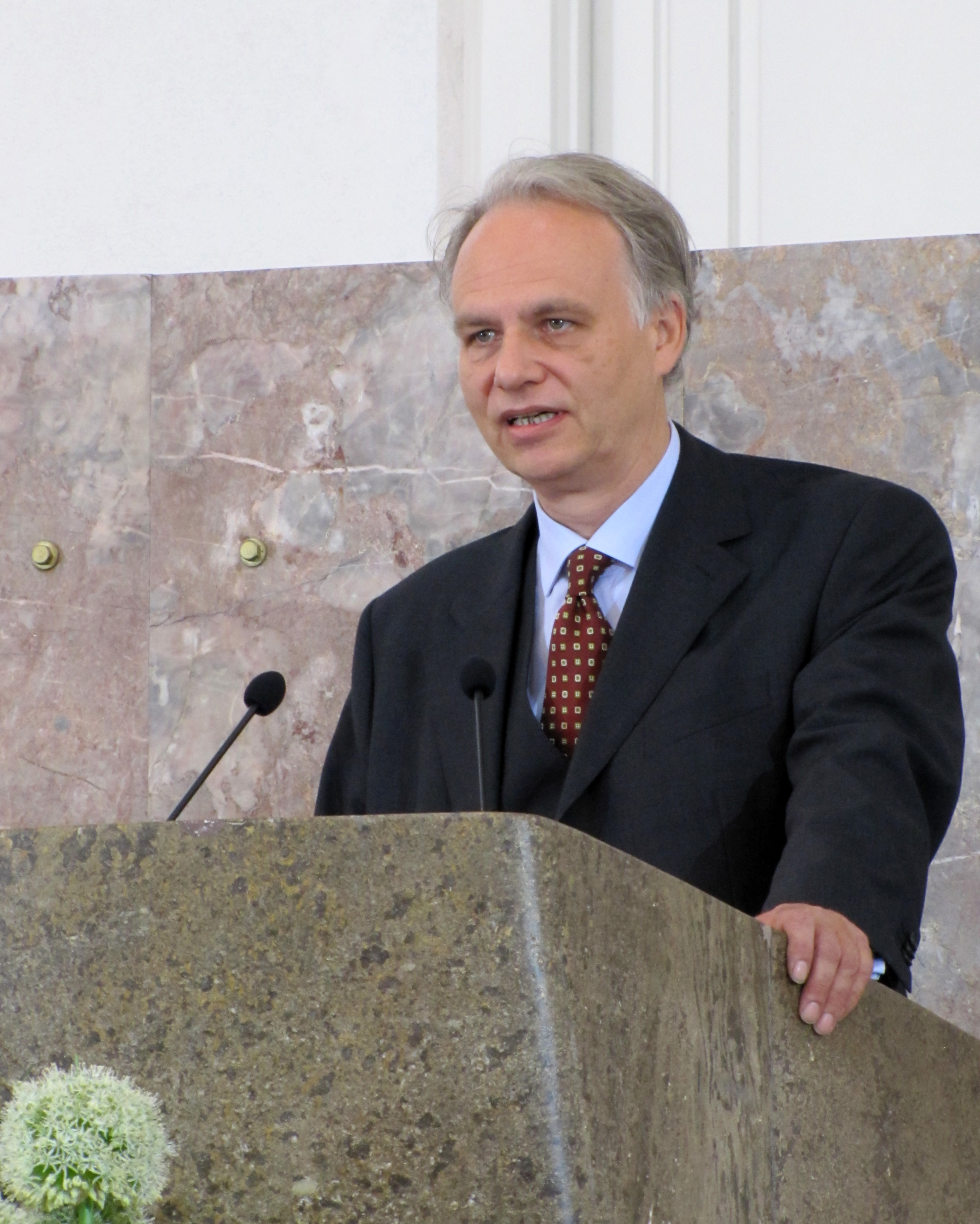 Jens Jessen (Preisrichter, Laudator und ZEIT-Redakteur), 2012 in der Frankfurter Paulskirche zur Verleihung des Ludwig-Boerne-Preises.